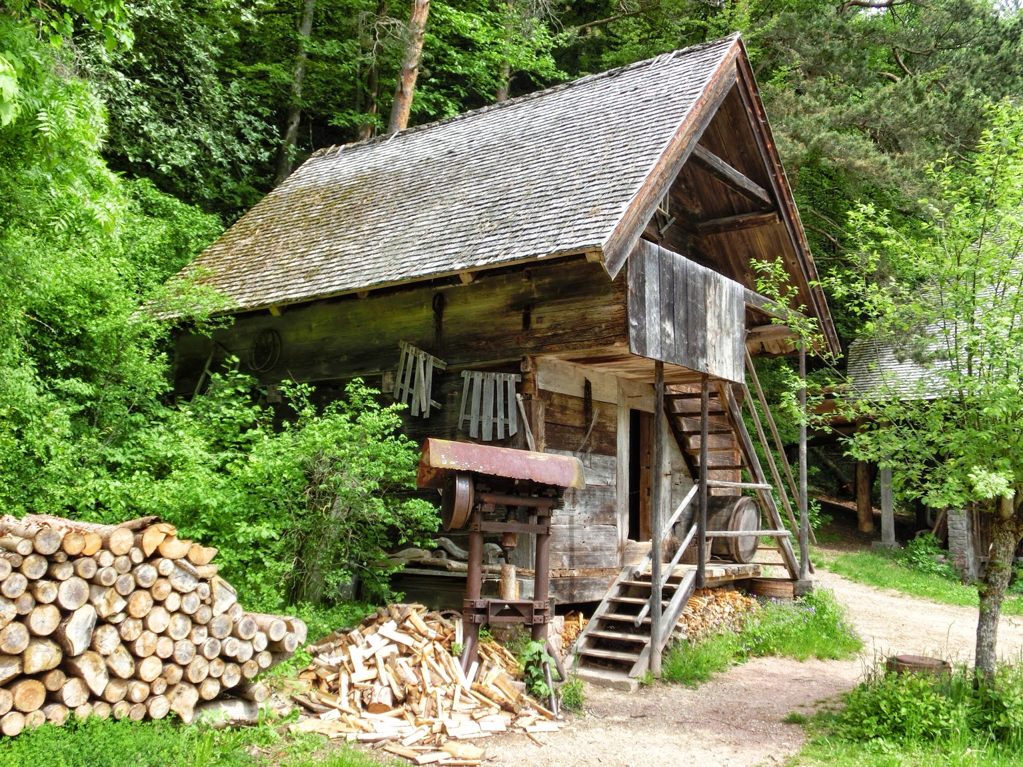 Deutschland - Baden-Württemberg - Landkreis Tuttlingen - Neuhausen ob Eck: Freilichtmuseum, Speicher Oberkirnach